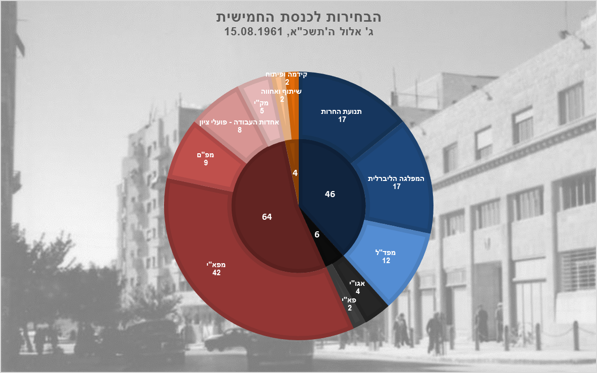 תוצאות הבחירות לכנסת החמישית